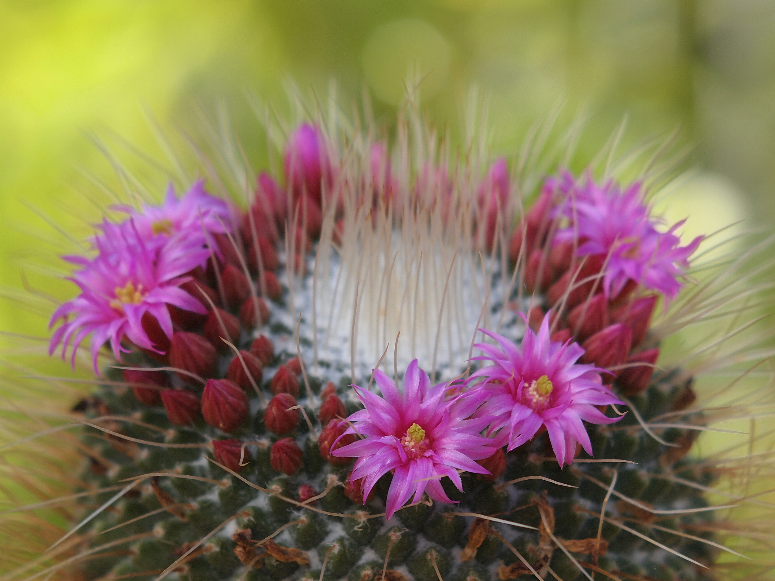 E-PL2 mit Steinheil-Auto-Cassarit 3,5/100 - Zwischenring - 5mm -Exakta Anschluss (Aufnahme Blende 5,6)